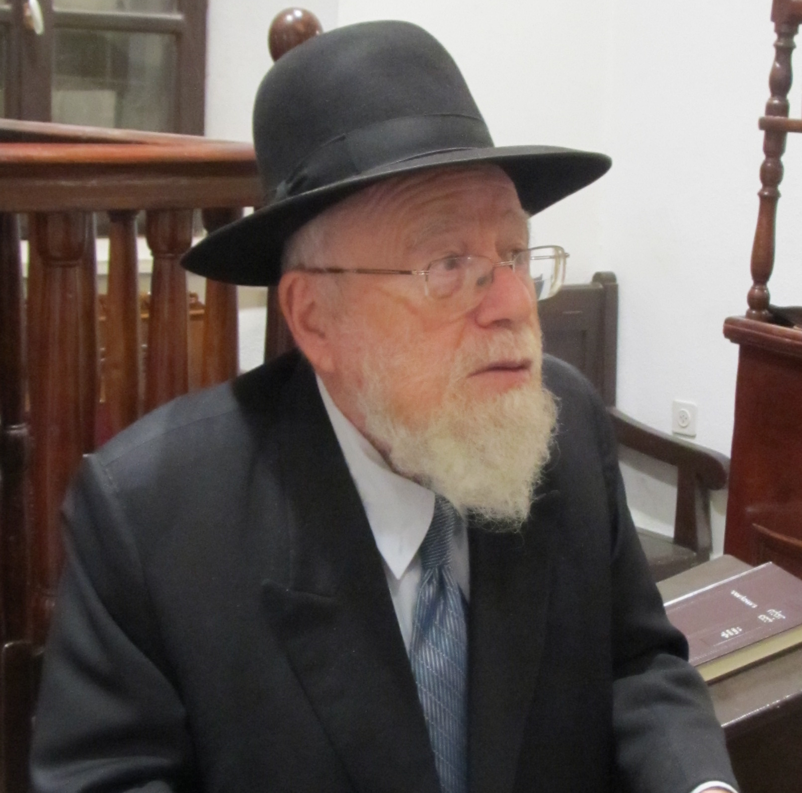 הרב דב ליאור בשיעור ב"בית הרב". ראש חודש אייר התשע"ג 2013